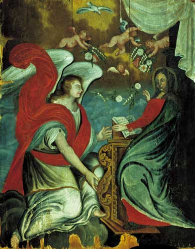 Звеставанне. З в. Коматава, Гродзенскі р-н. Музей старажытна- беларускай культуры НАН Беларусі